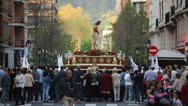 Procesion de La Amargura